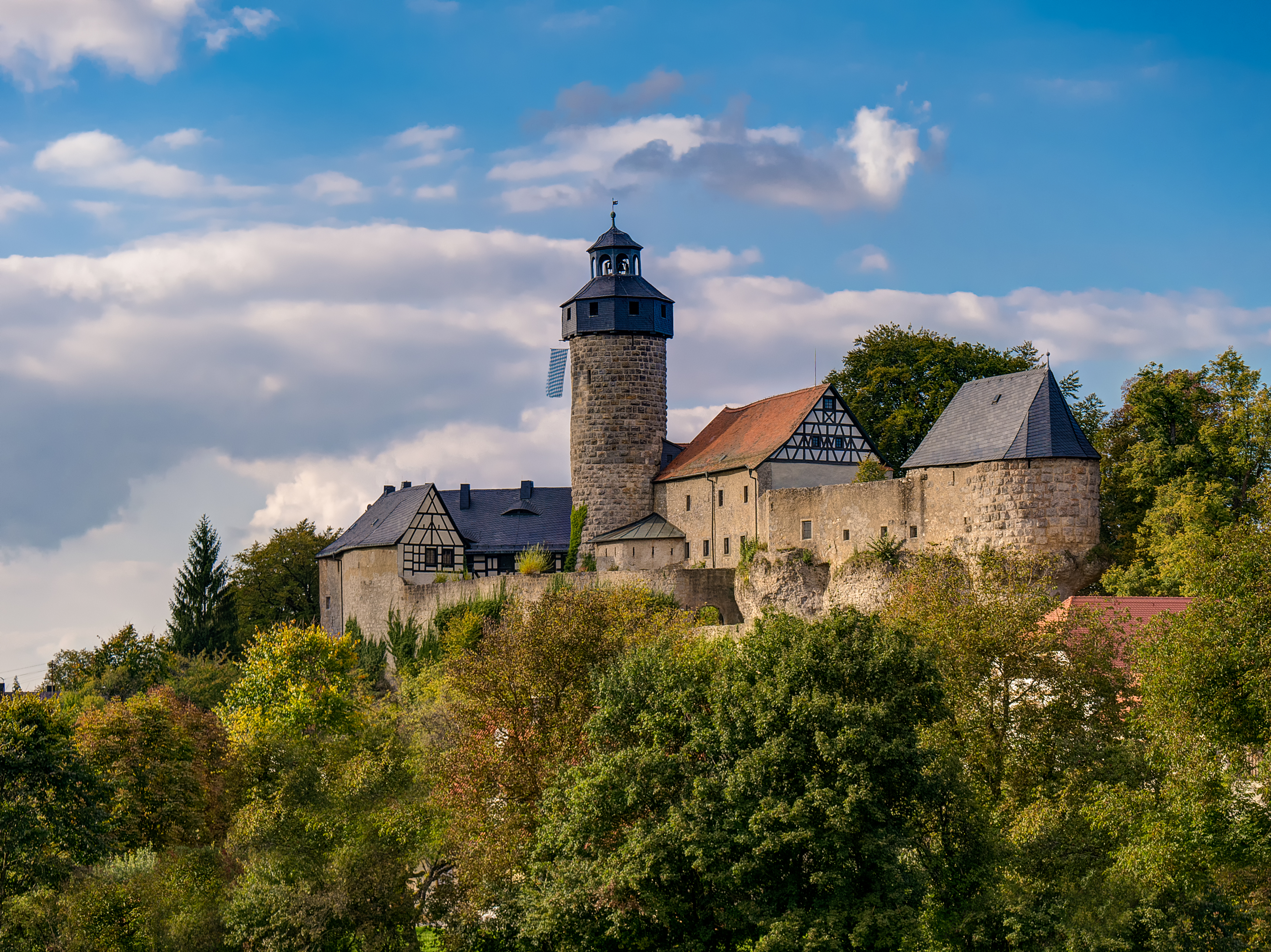 Burg ZwernitzThis is a photograph of an architectural monument.